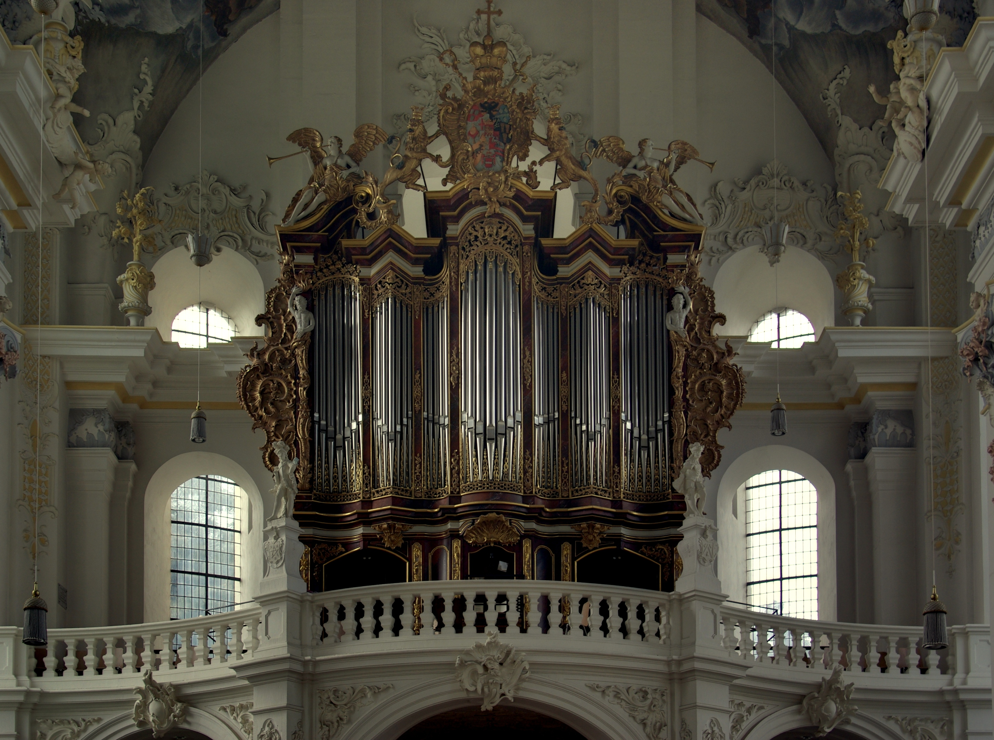 Trier, St. Paulin, Orgel